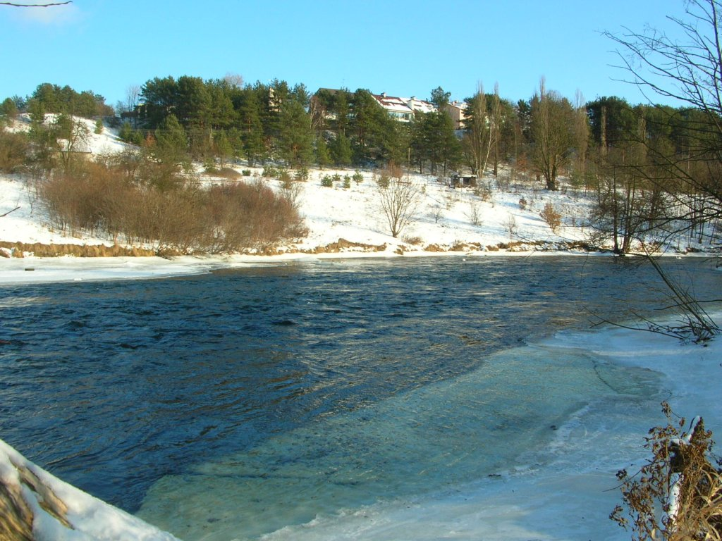 Zimą Brda z trudem pokrywa się lodem z uwagi na bystry nurt.